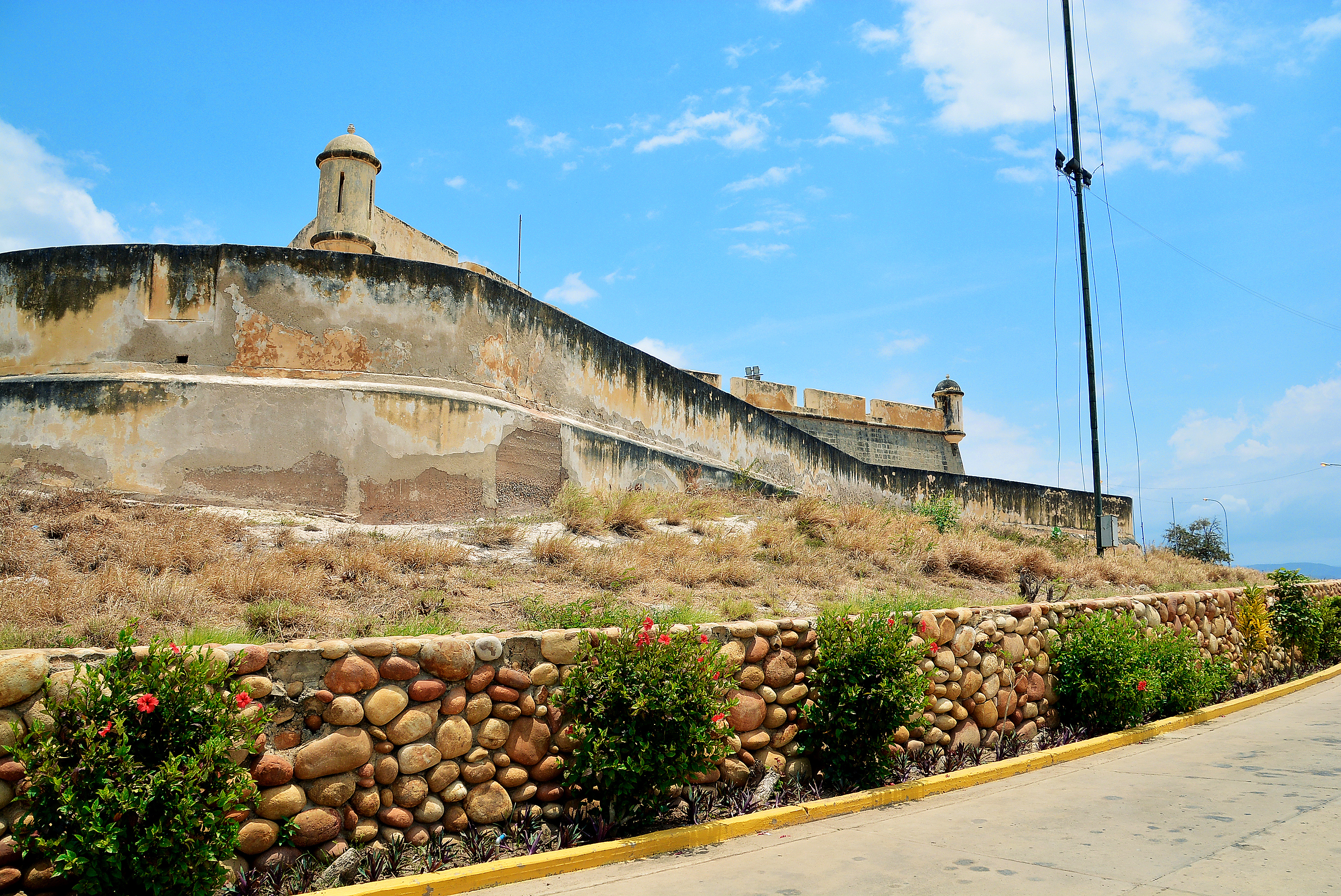 Castillo de San Antonio de la Eminencia Entrada Lateral.Cumaná Sucre Venezuela